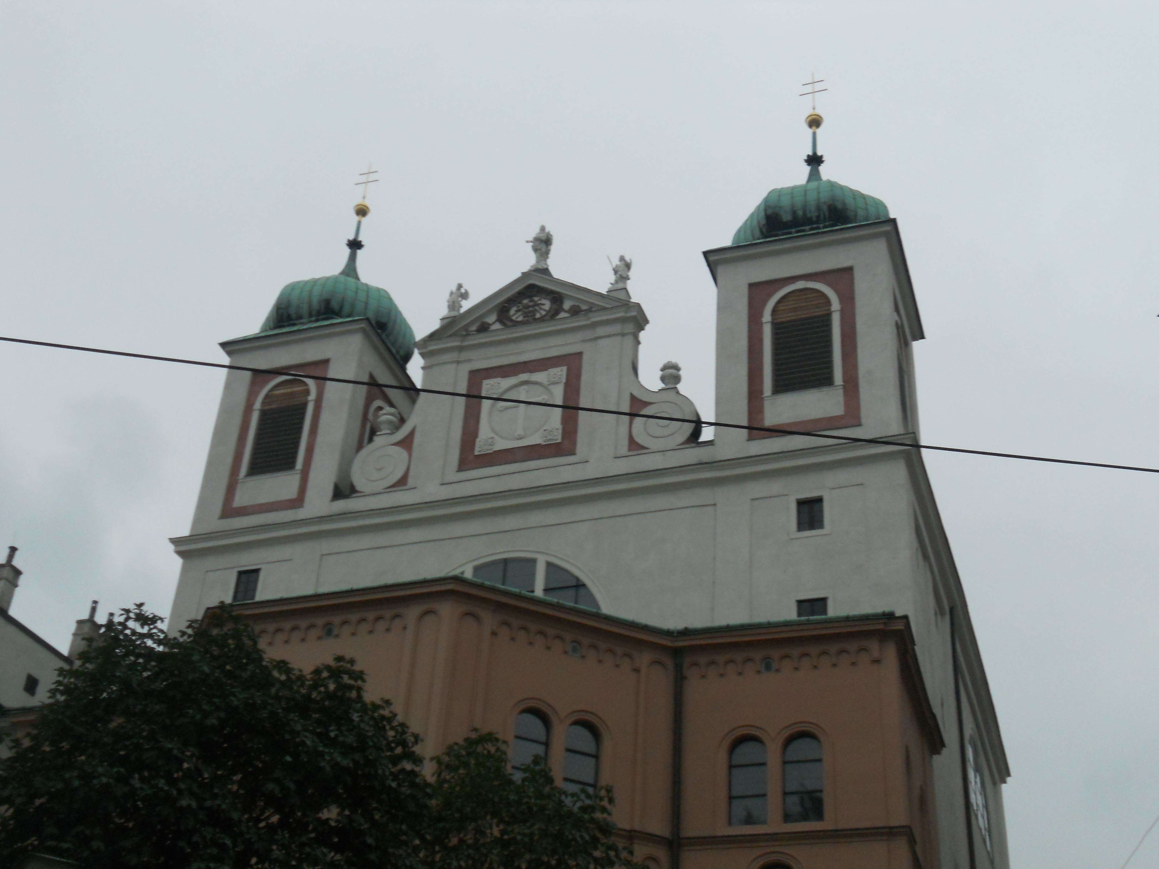 Dominikanerkirche Sancta Maria Rotunda mit Dominikanerkonvent